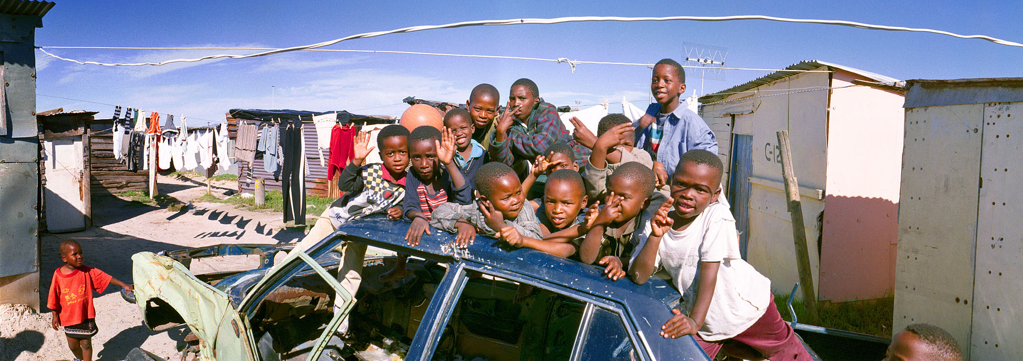 Beschreibung: Kinder im Township Khayelitsha Quelle: Bild selbst erstellt